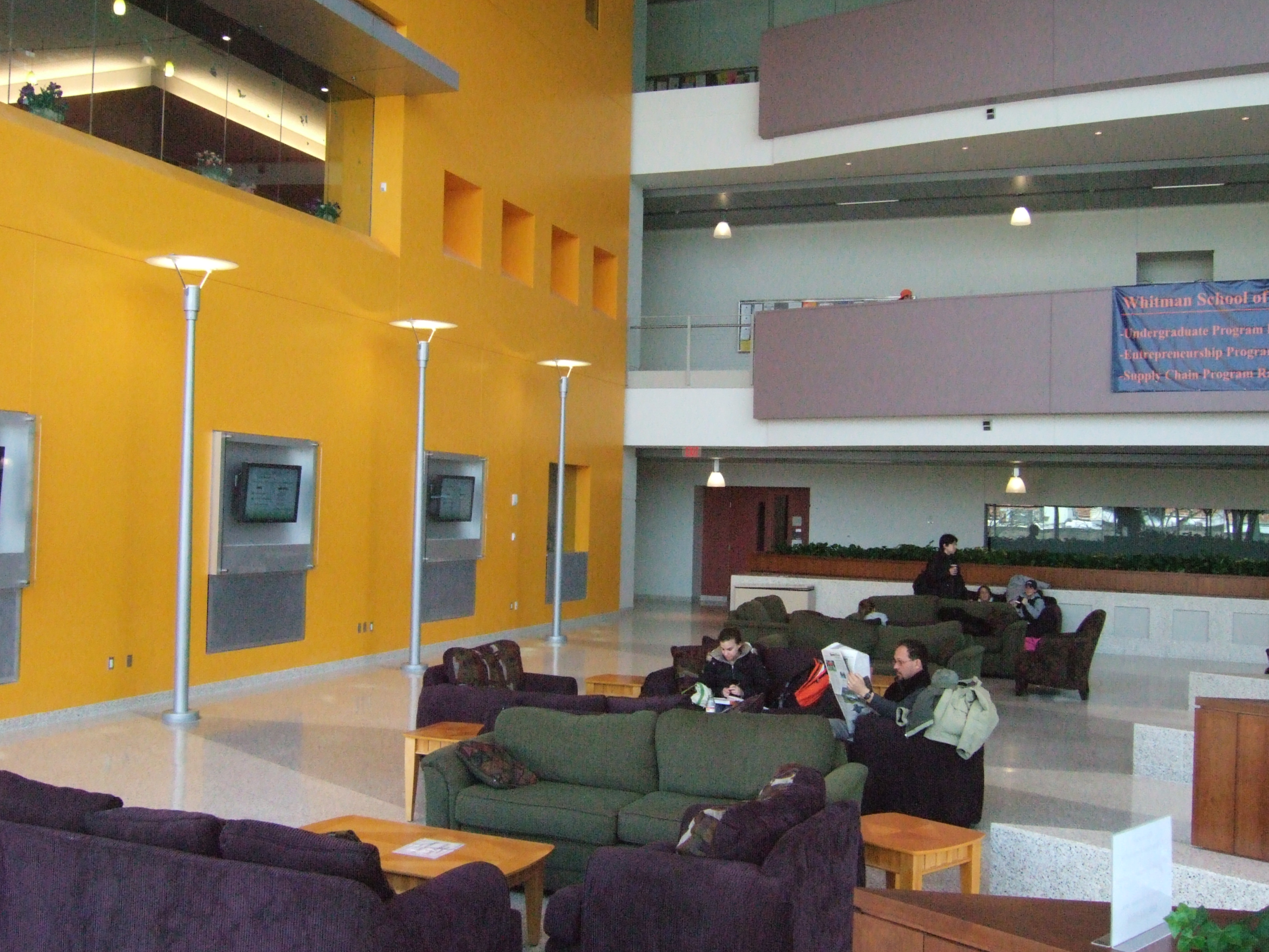 03/07/06 taken by Kisstory